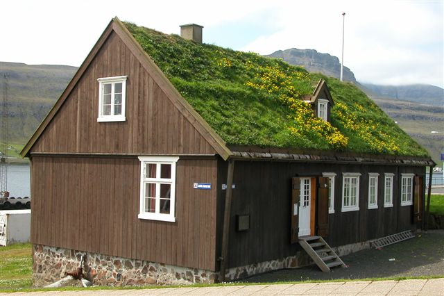 Tvøroyri museum